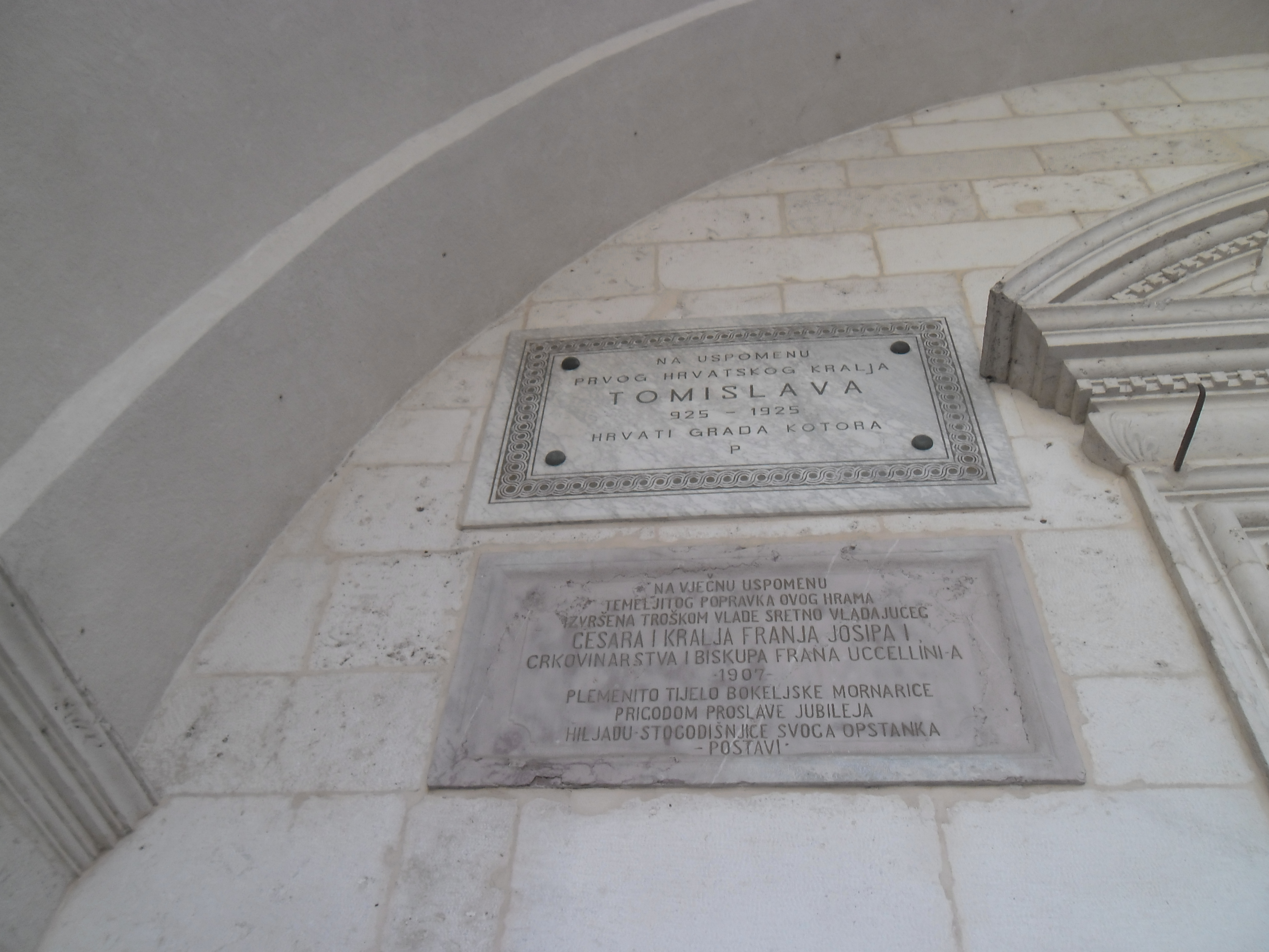 spomen-ploča hrvatskome kralju Tomislavu na Katedrali svetog Tripuna u Kotoru